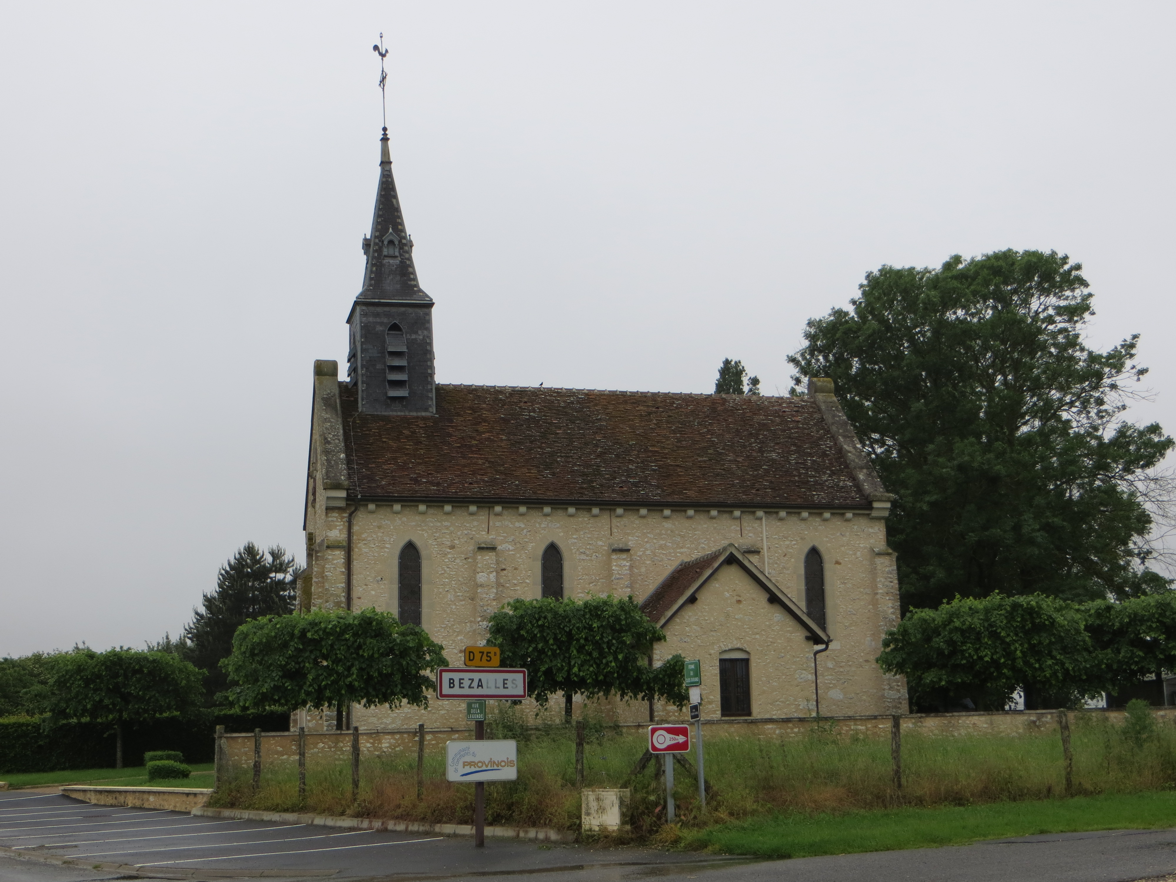 Vue générale de l'église